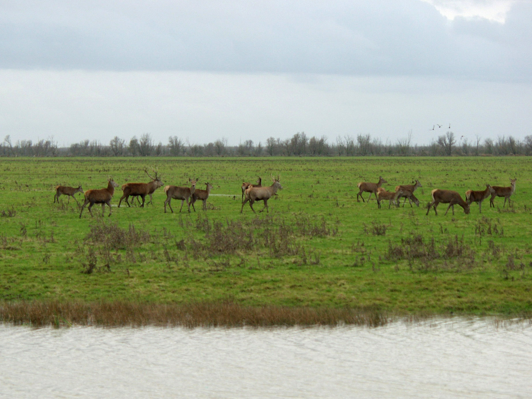 Rothirsche im Oostvaardersplassen Natuurmonument, Flevoland NL